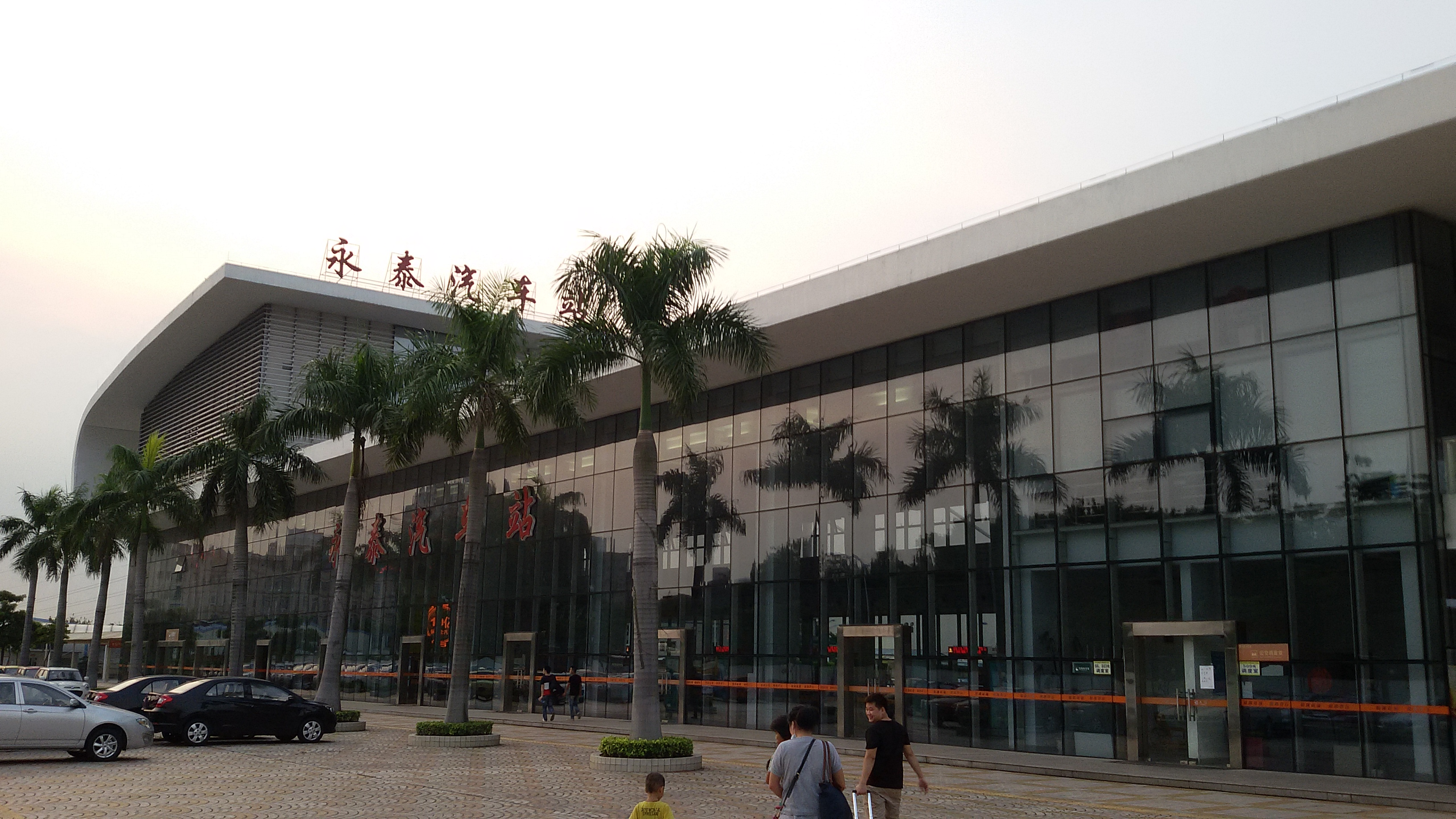 粵語: 永泰汽車站